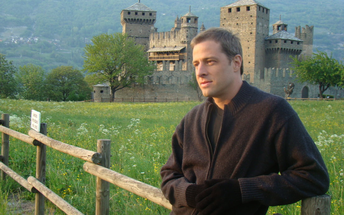 escritor Patricio Sturlese, 2008, Italia.